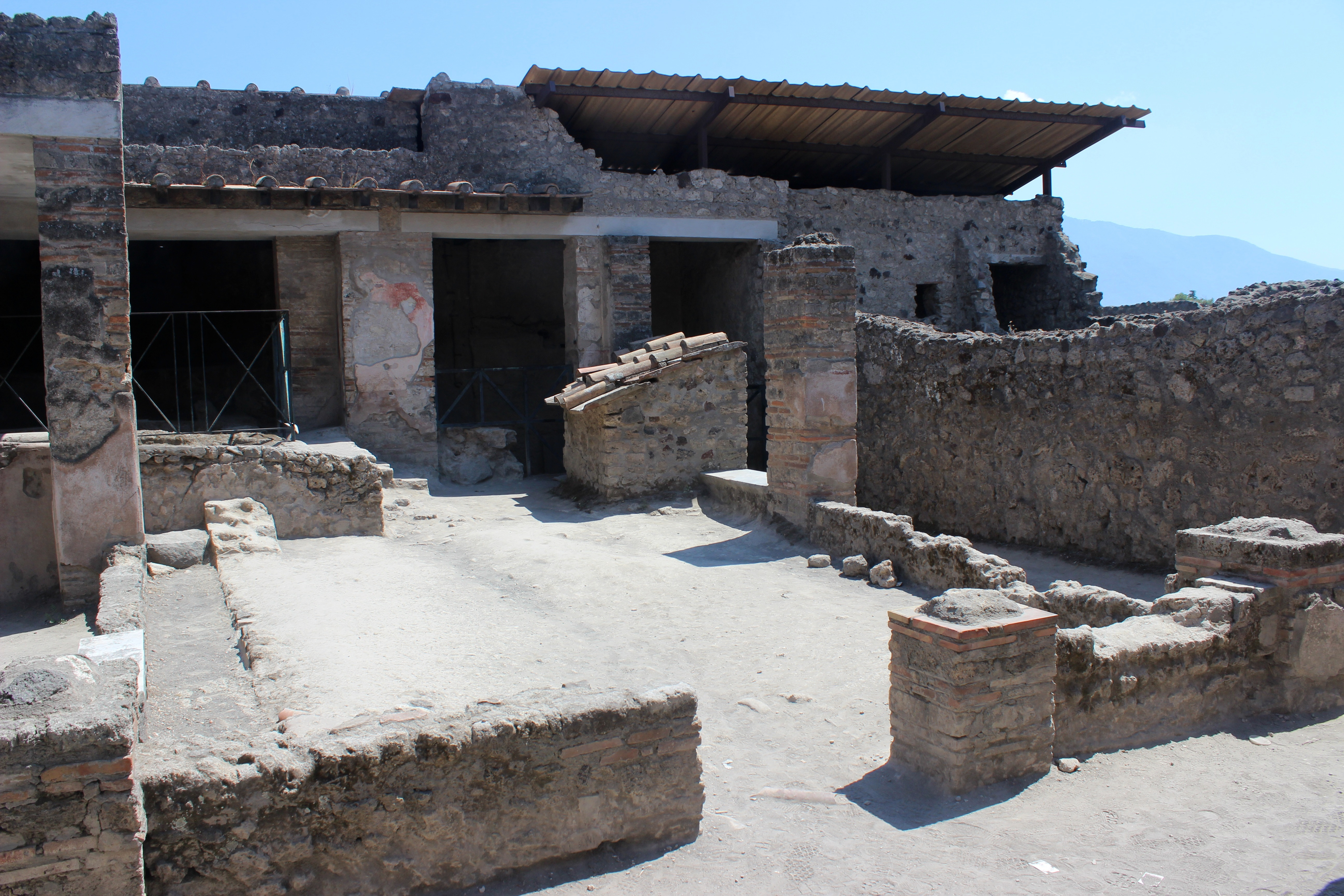 Pompeya. Fullonica de Stephanus.